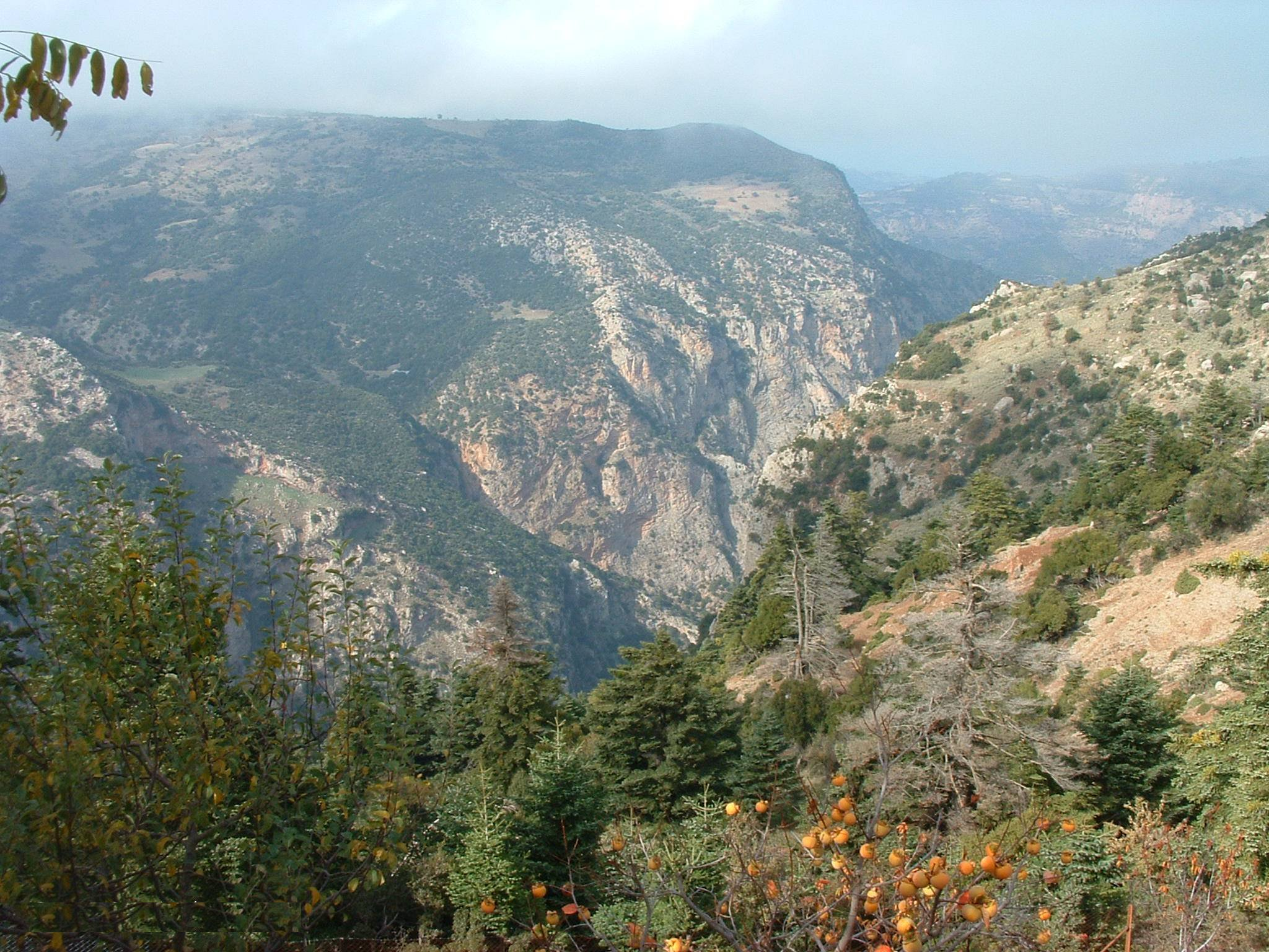 november 2005